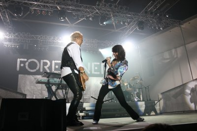 == Лицензиране ==